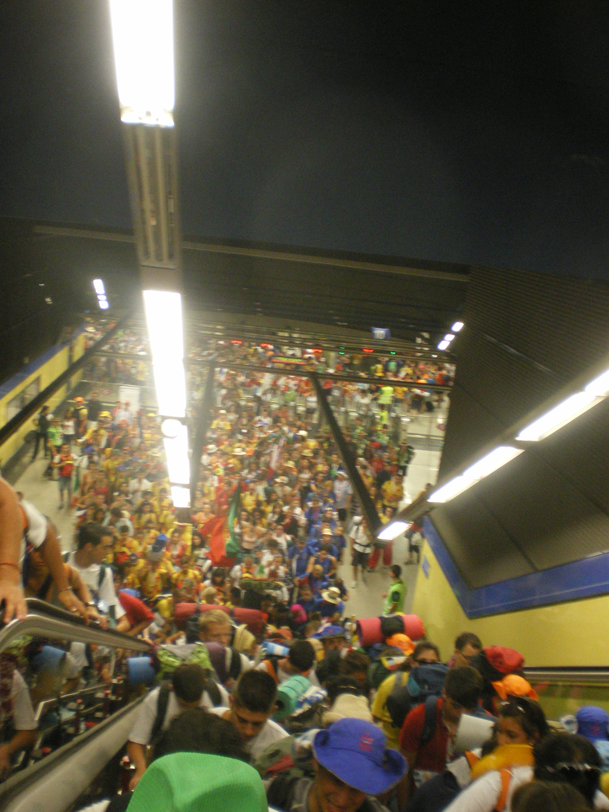 Escalator et foule de jeunes de JMJ